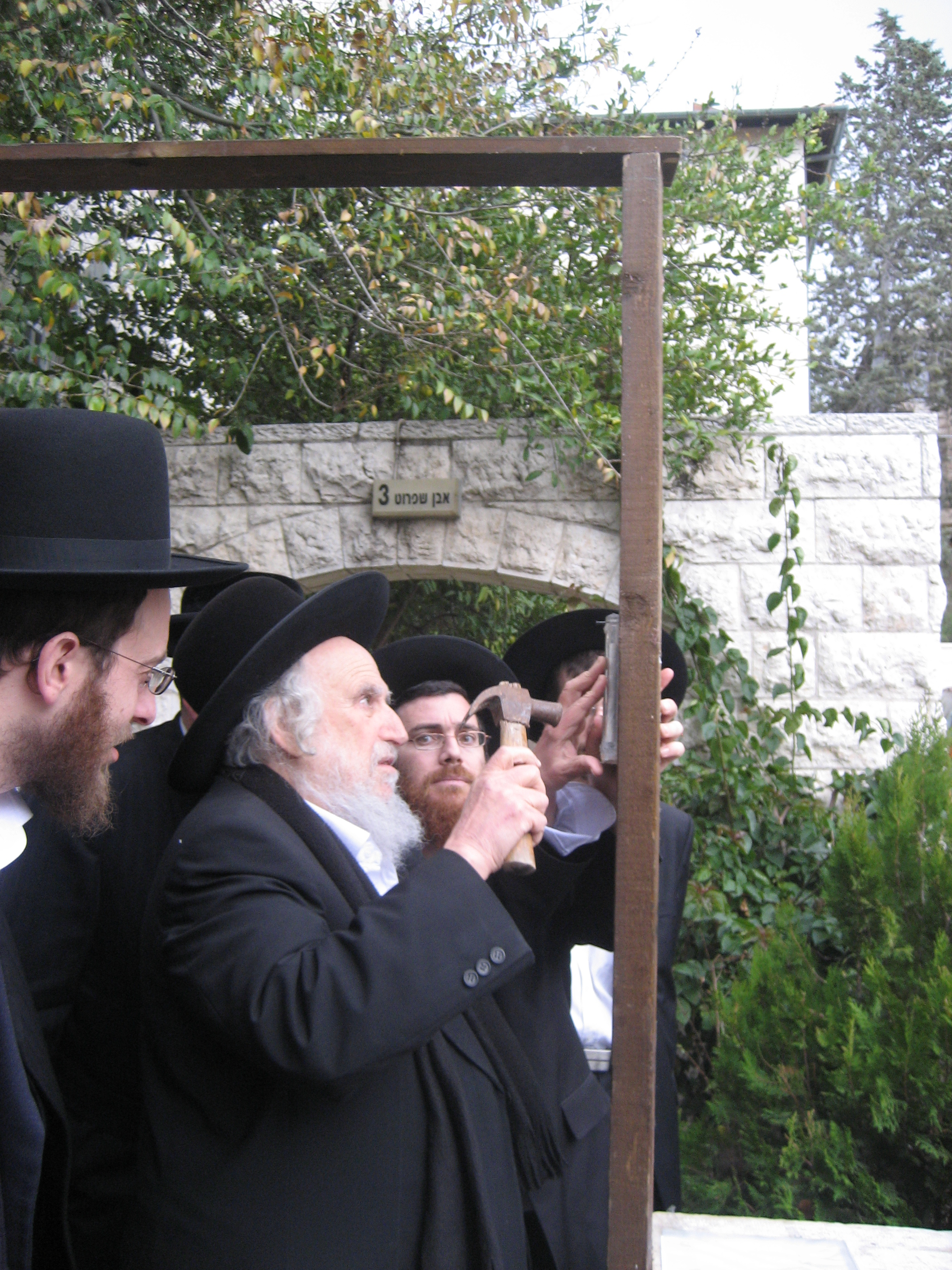 הרב שמואל אוירבך בקביעת מזוזה, מימינו הרב יוסף פטרוף